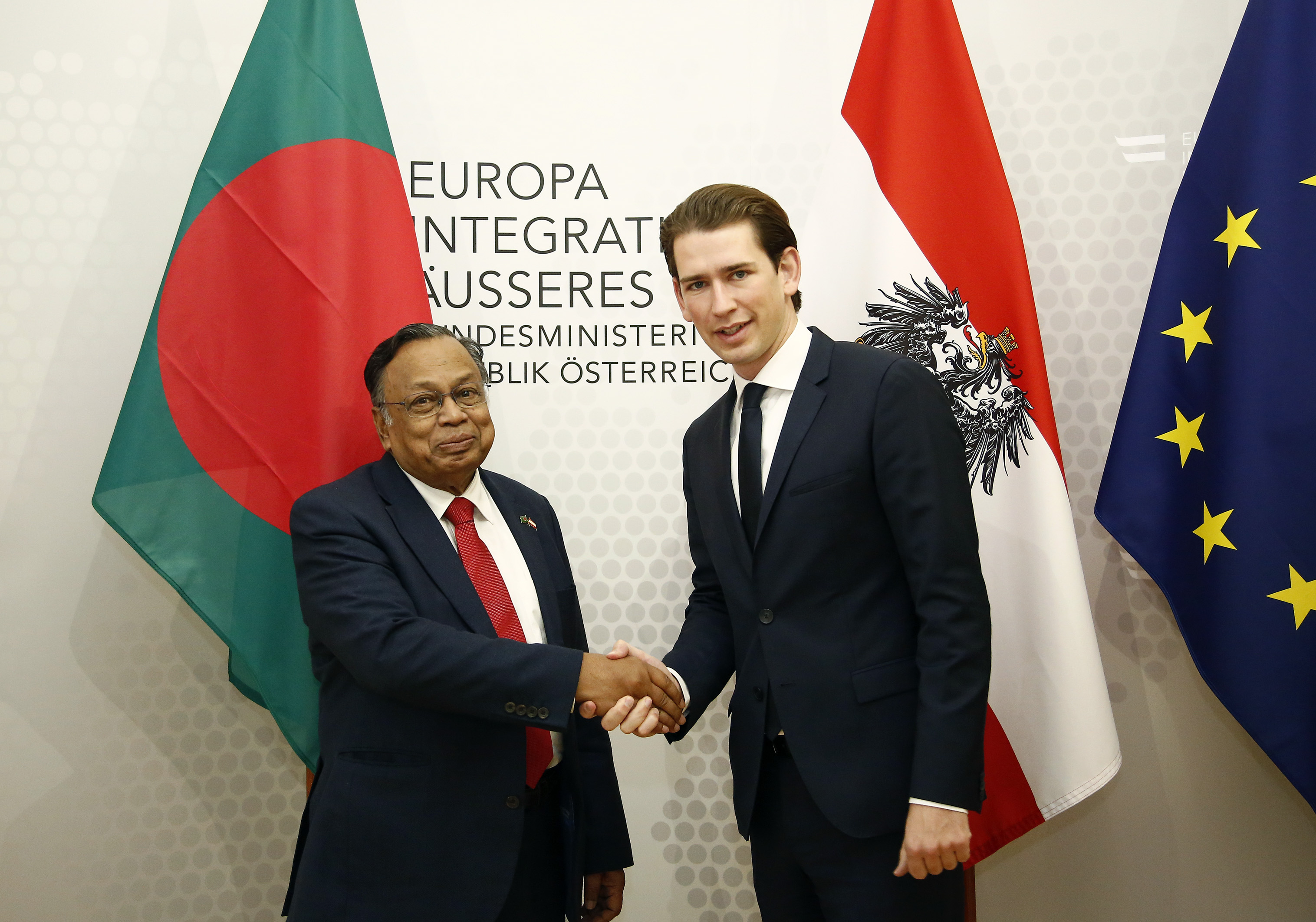 Bundesminister Sebastian Kurz empfÃ¤ngt den AuÃenminister von Bangladesh, Abul Hassan Mahmud ALI. Wien, 11.10.2016, Foto: Dragan Tatic